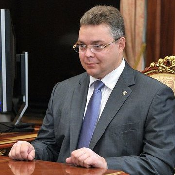 Губернатор Ставропольского края Владимир Владимиров